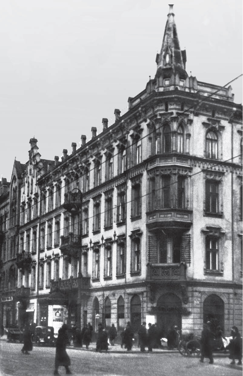 Marszałkowska